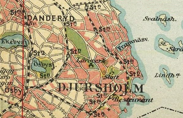 Del av 1917 års karta över Stockholm med omgivningar visande Djursholm med Djursholmsbanans sträckning